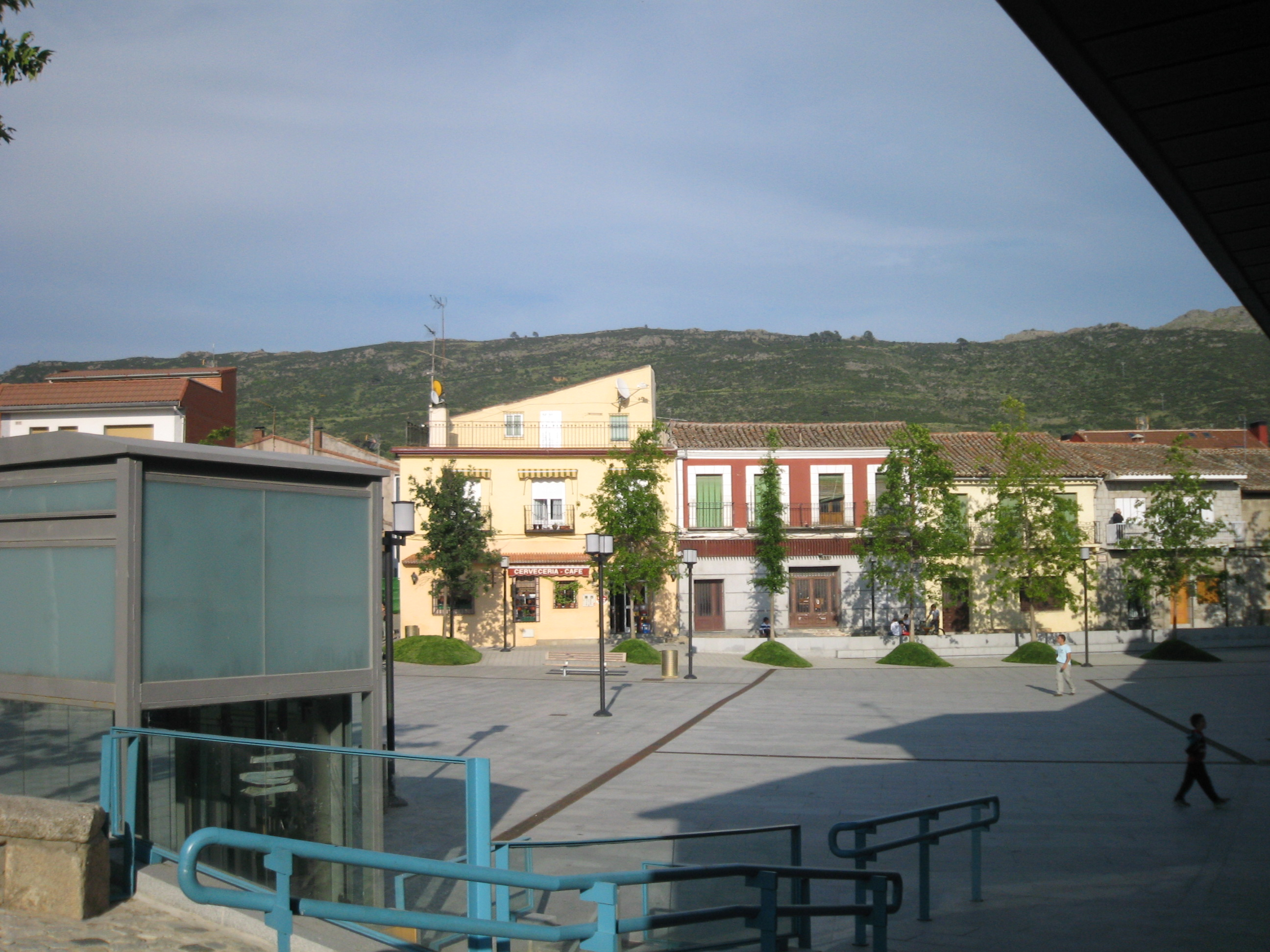 Robledo de Chavela